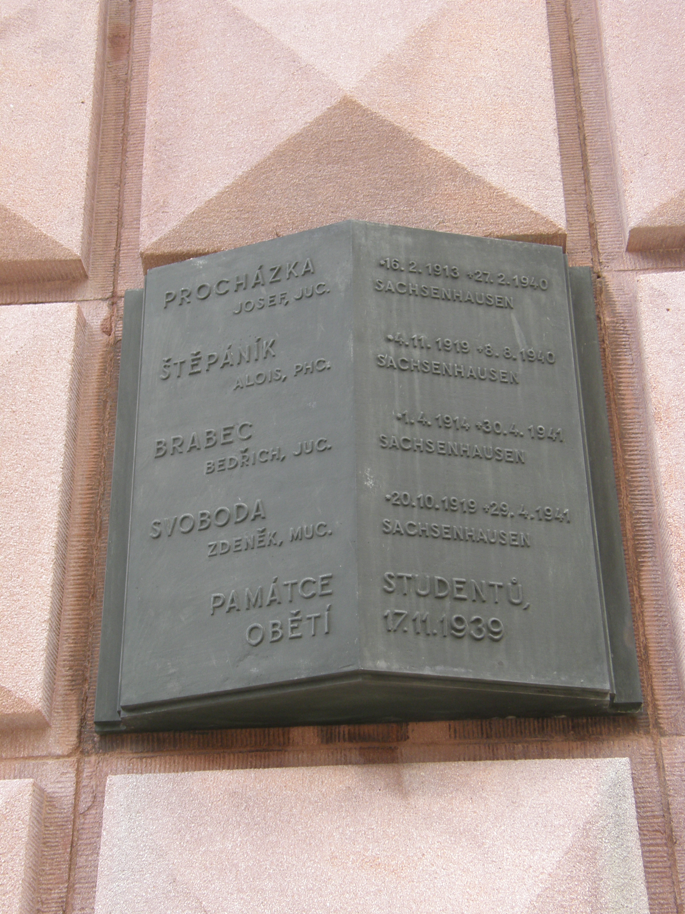 Památník obětem studentům na Kounicových kolejích